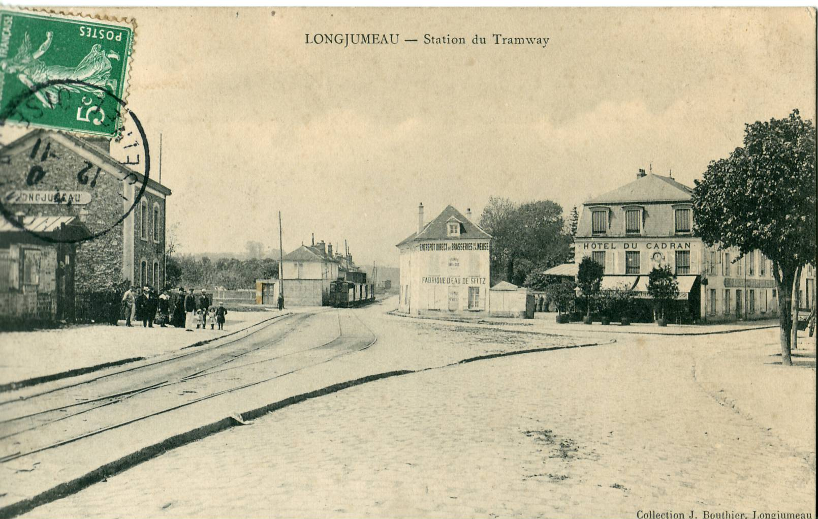 Carte postale ancienne éditée par BouthierLONGJUMEAU : La station du Tramway (ligne dite de l' Arpajonnais)